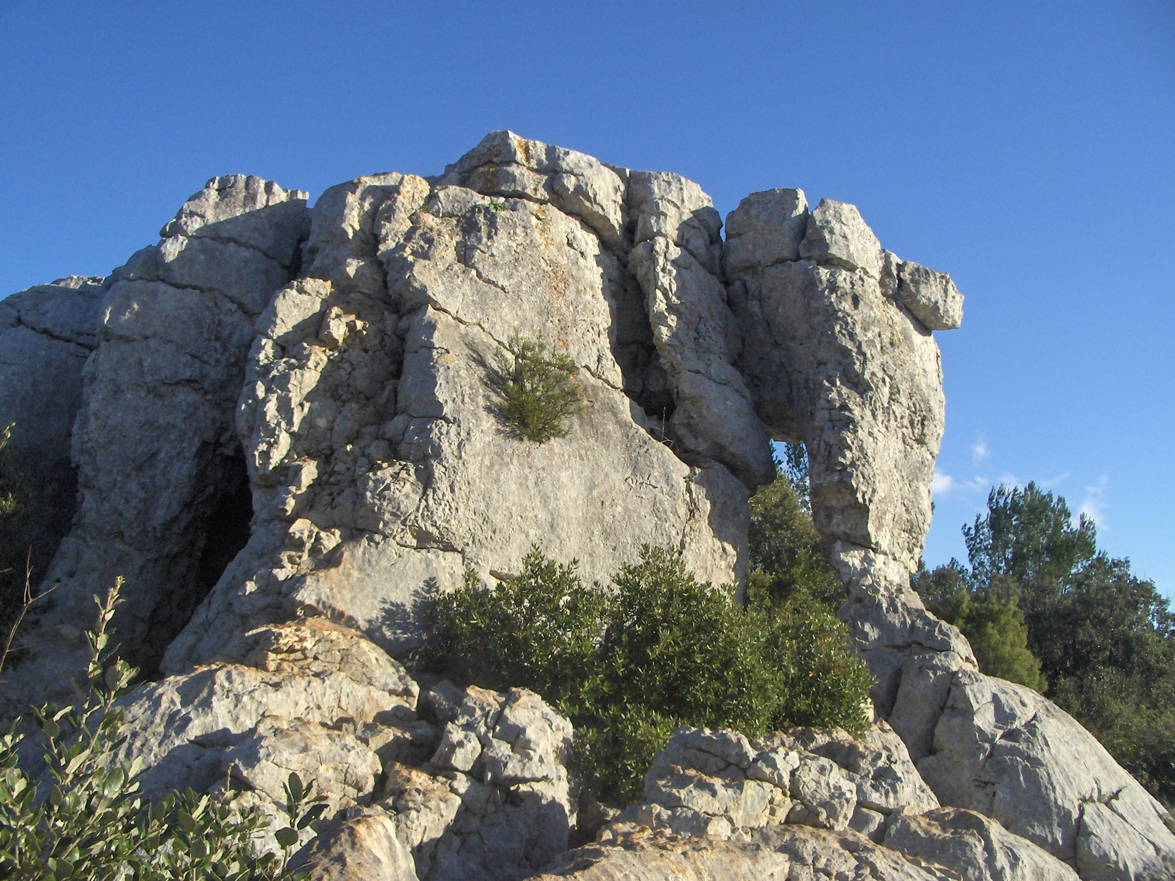 Rocher sur le plateau de Siou Blanc